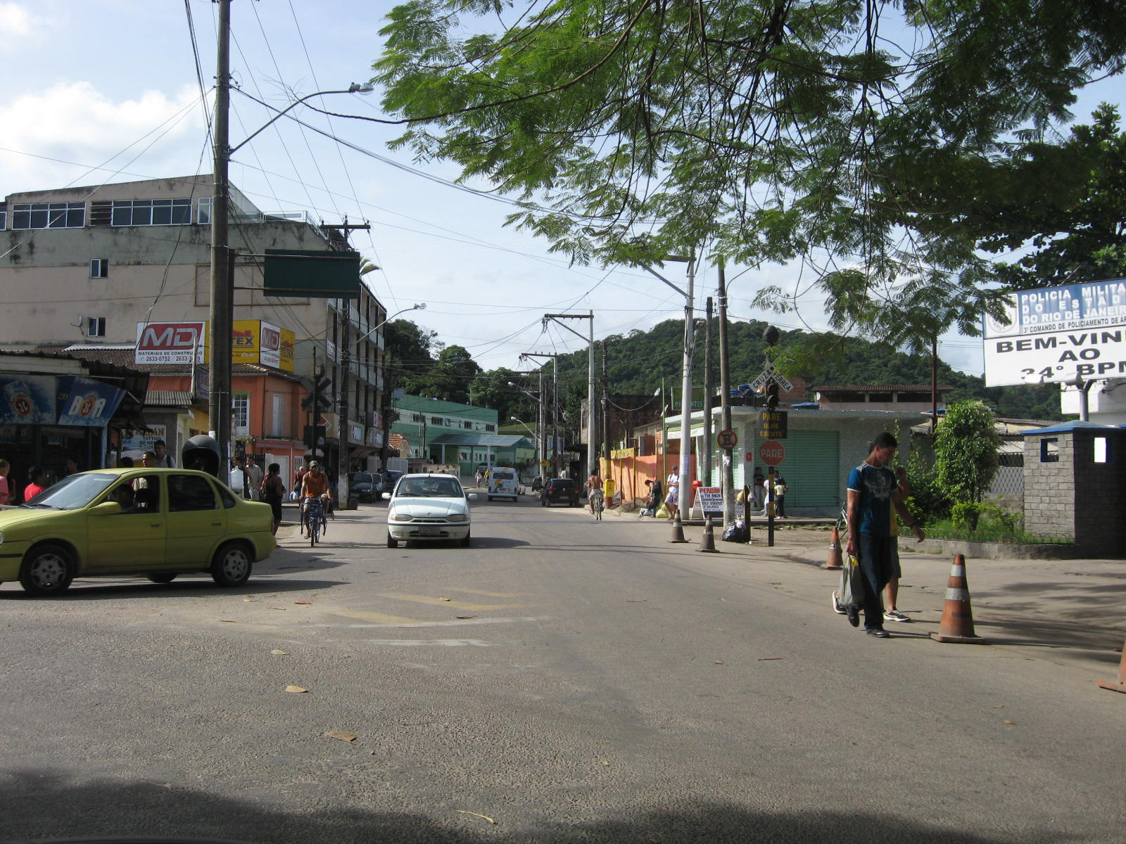 Vista da área central de Magé, no estado do Rio de Janeiro, Brasil.